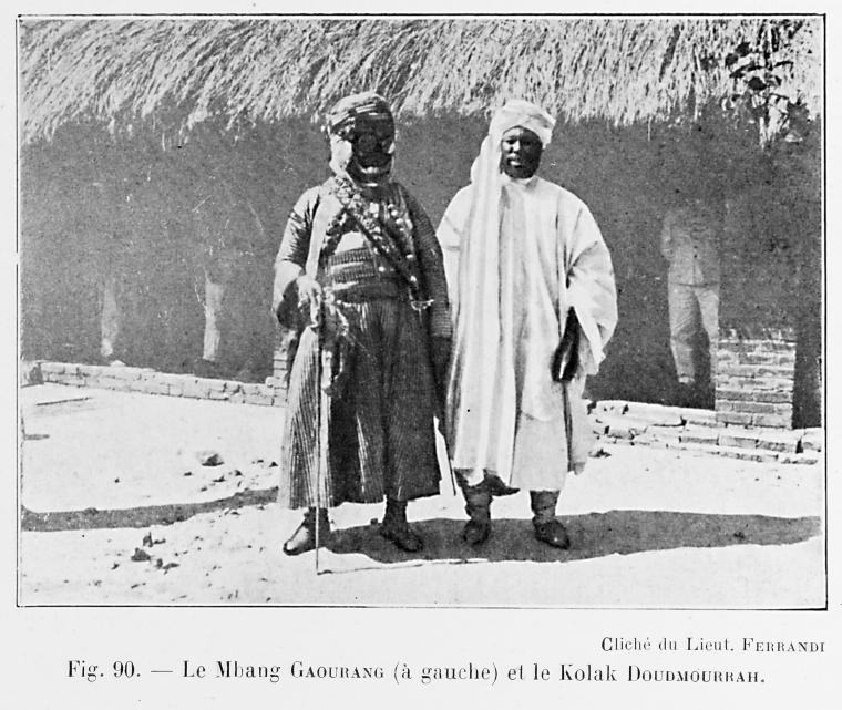 Le Mbang Gaourang (à gauche) et le Kolak Doudmourrah. From L'Afrique Équatoriale Française: le pays, les habitants, la colonisation, les pouvoirs publics. Préf. de M. Merlin. Avec 186 reproductions photographiques, 33 diagrammes, profils, et 7 cartes dont 5 en couleurs, (published 1918).